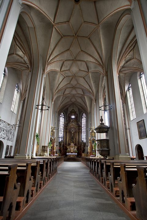 Opole. Katedra Podwyższenia Krzyża